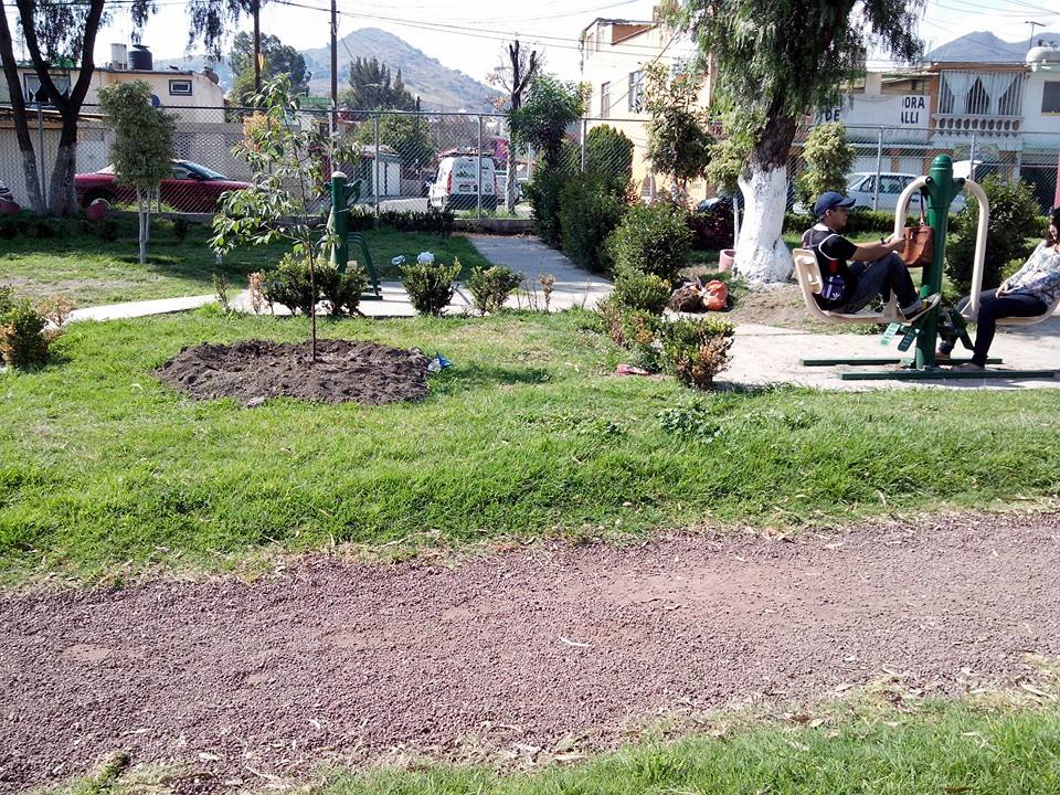 espacios públicos creado con ingresos del gobierno para la interacción social